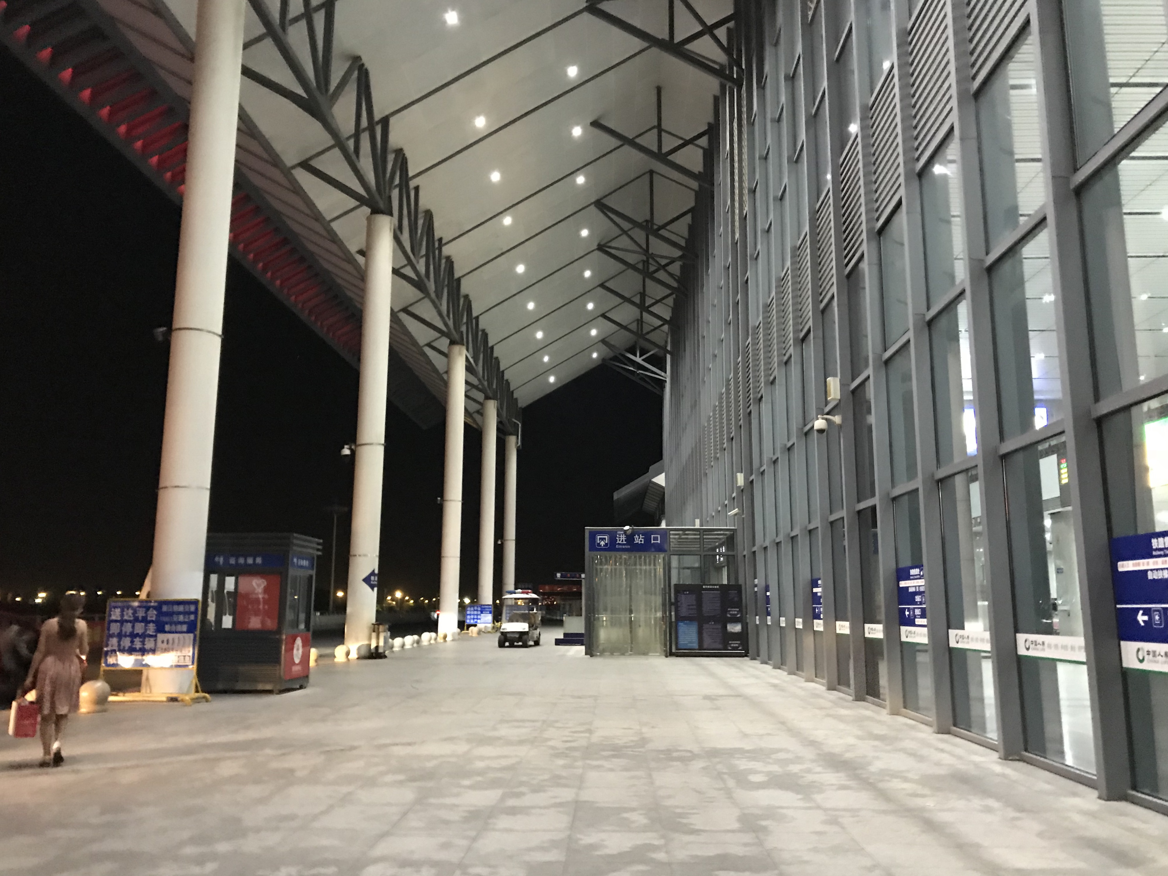 嘉興南駅の入り口